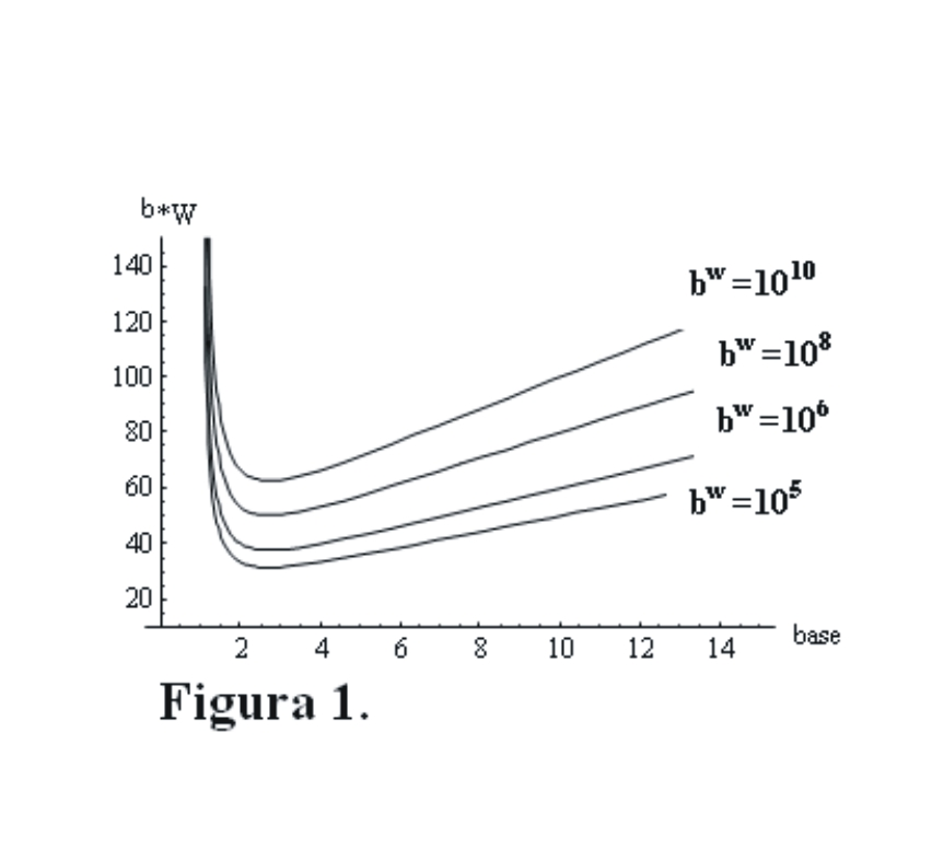 Grafico calcolatori ternari